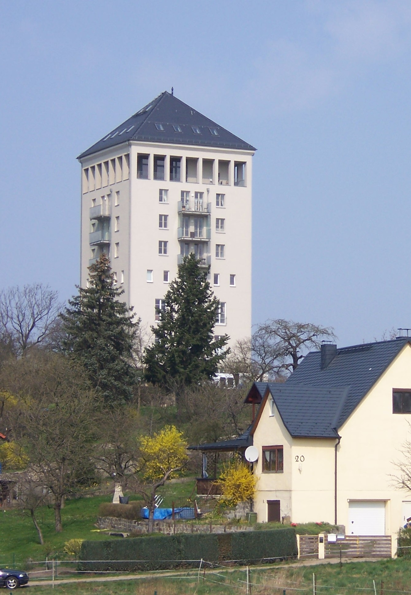 Wasserturm in Dresden-Klotzsche